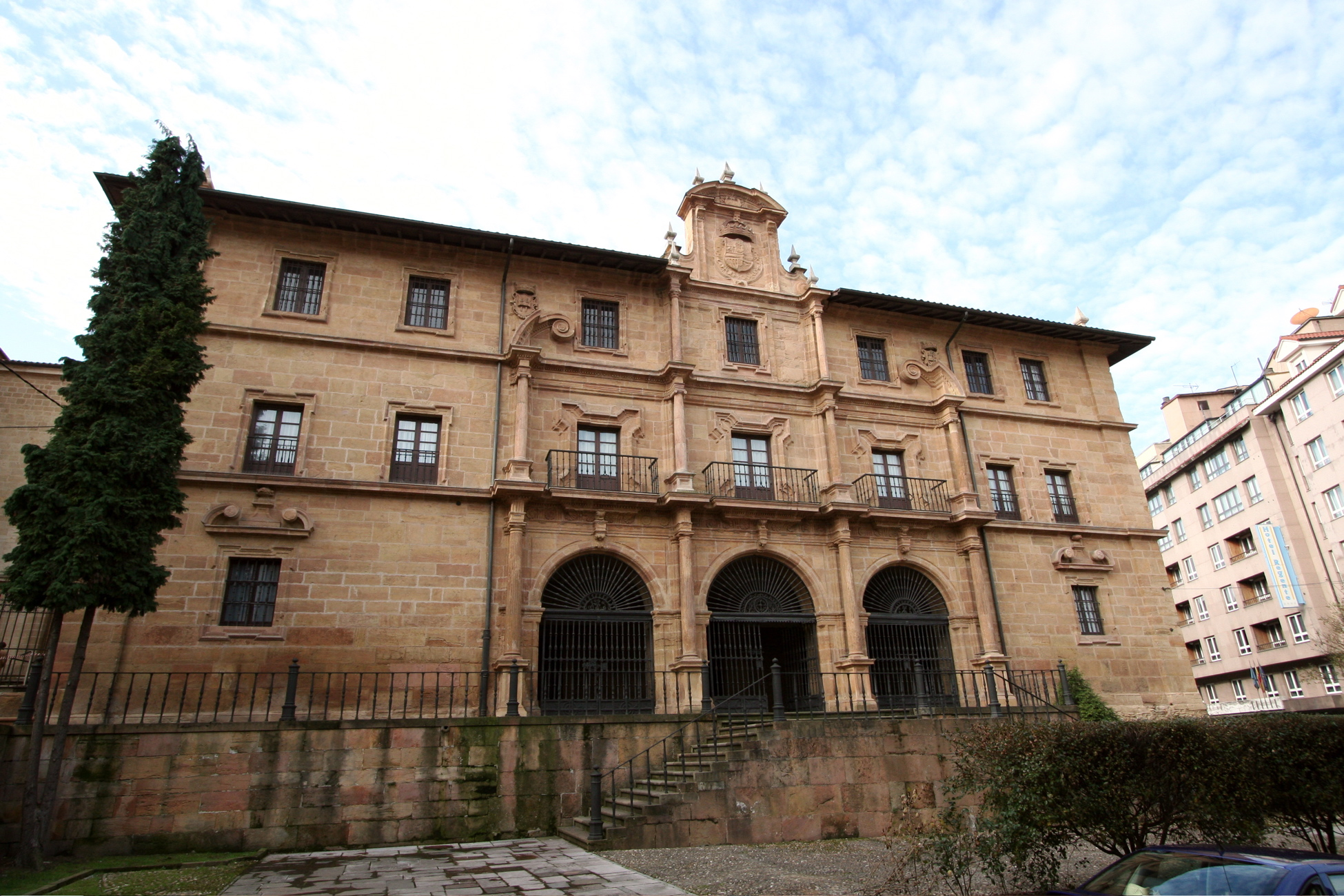 Fachada del Monasterio de San Pelayo (las pelayas).